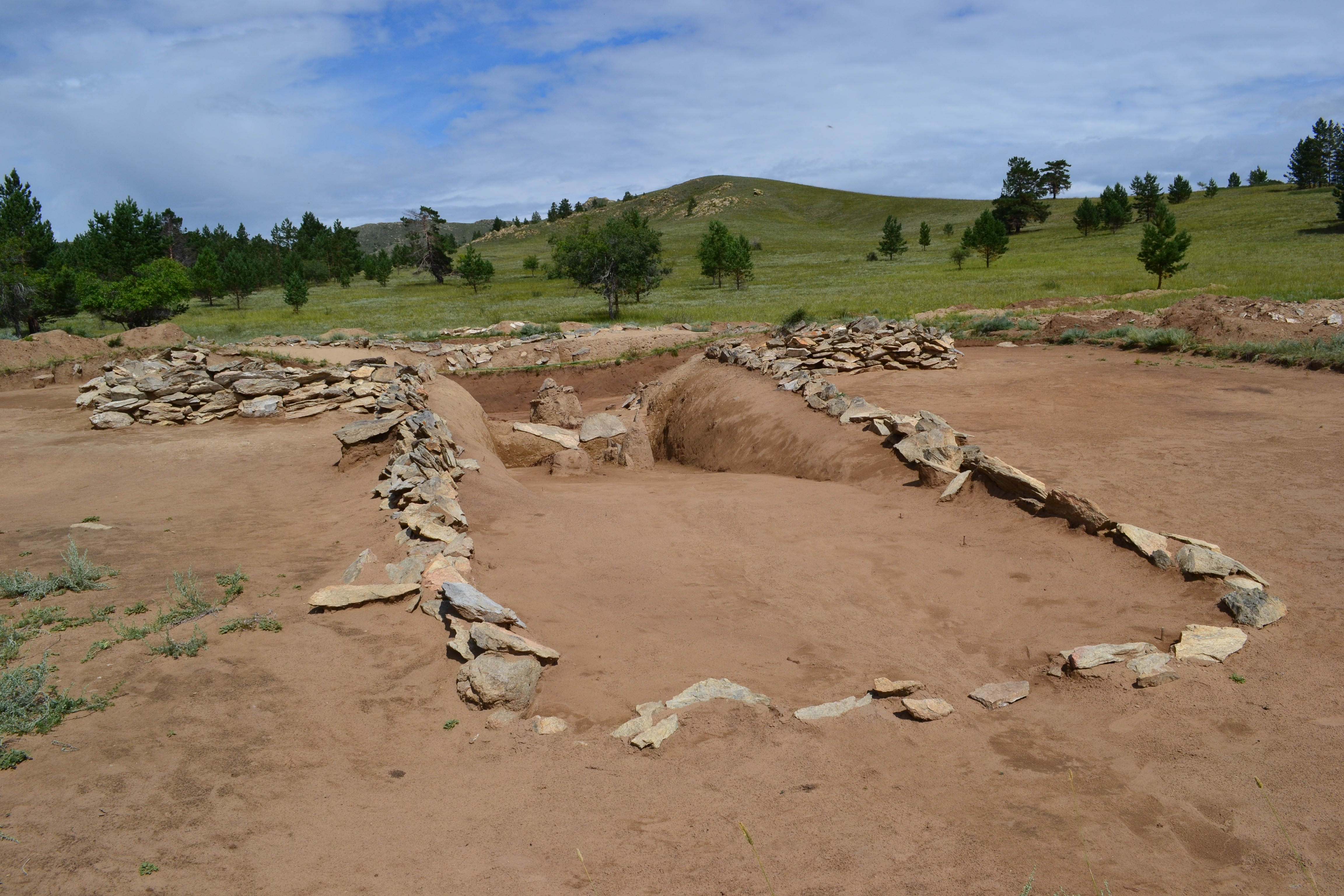 Результат раскопок хуннского могильника Оргойтон в 2011 году